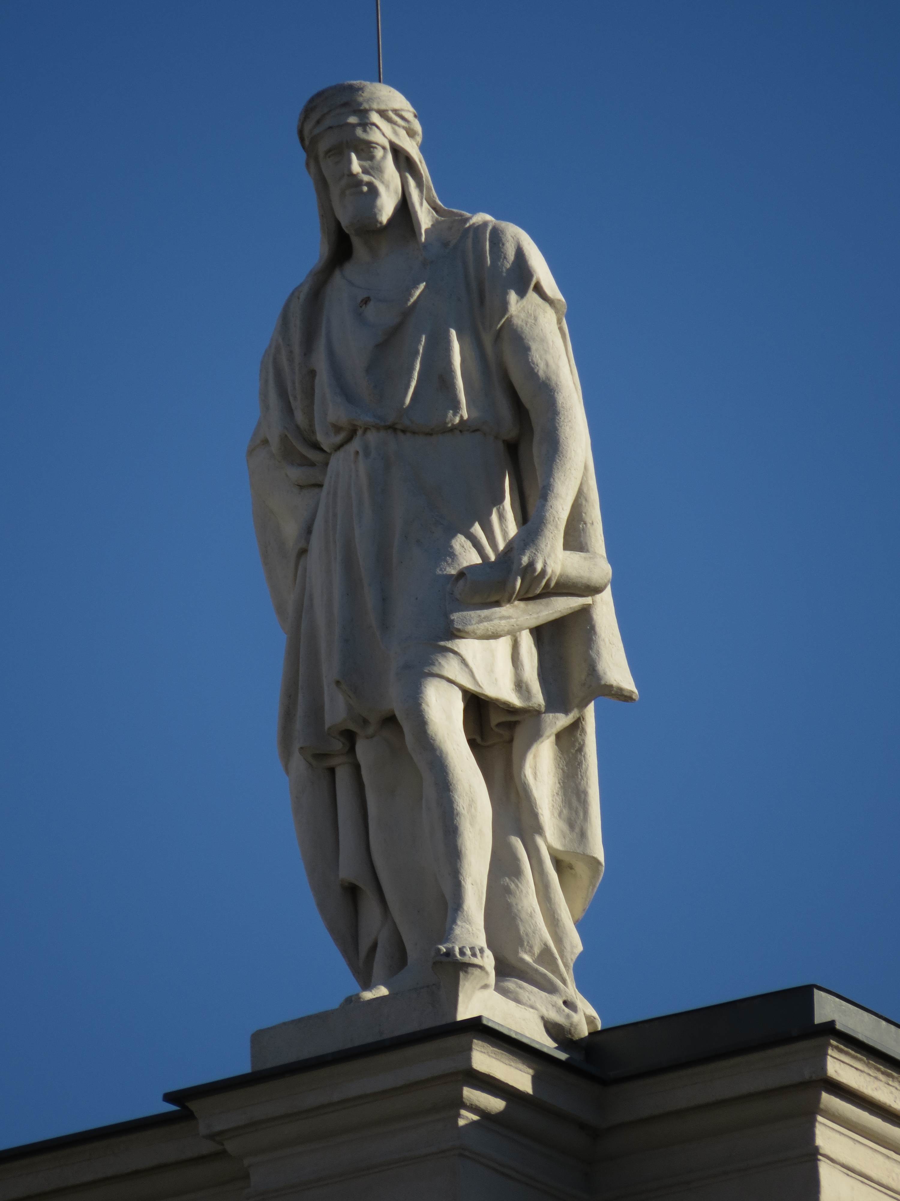 Naturhistorisches Museum Wien